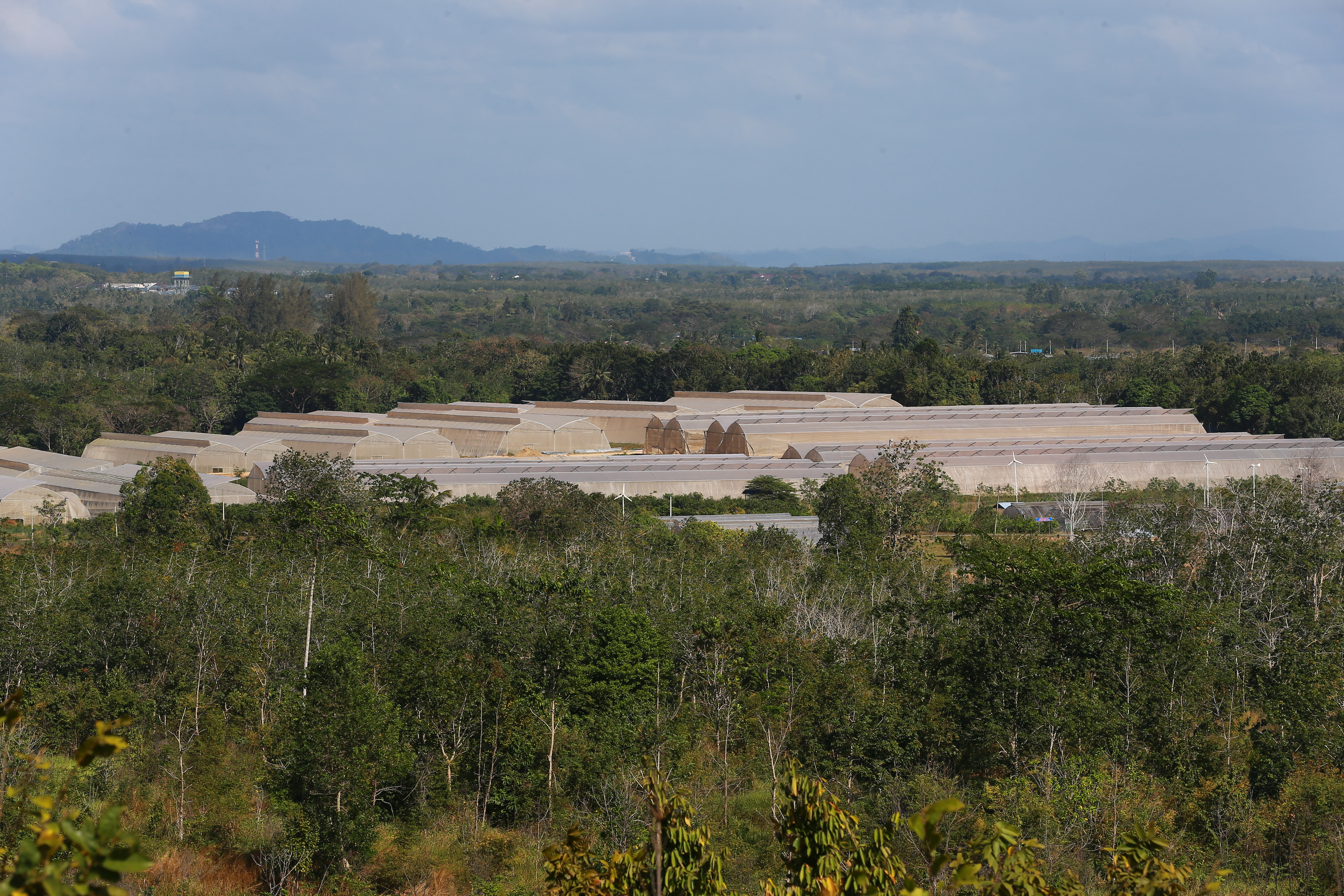 50 Greenhouses (Control Environment Agriculture System)